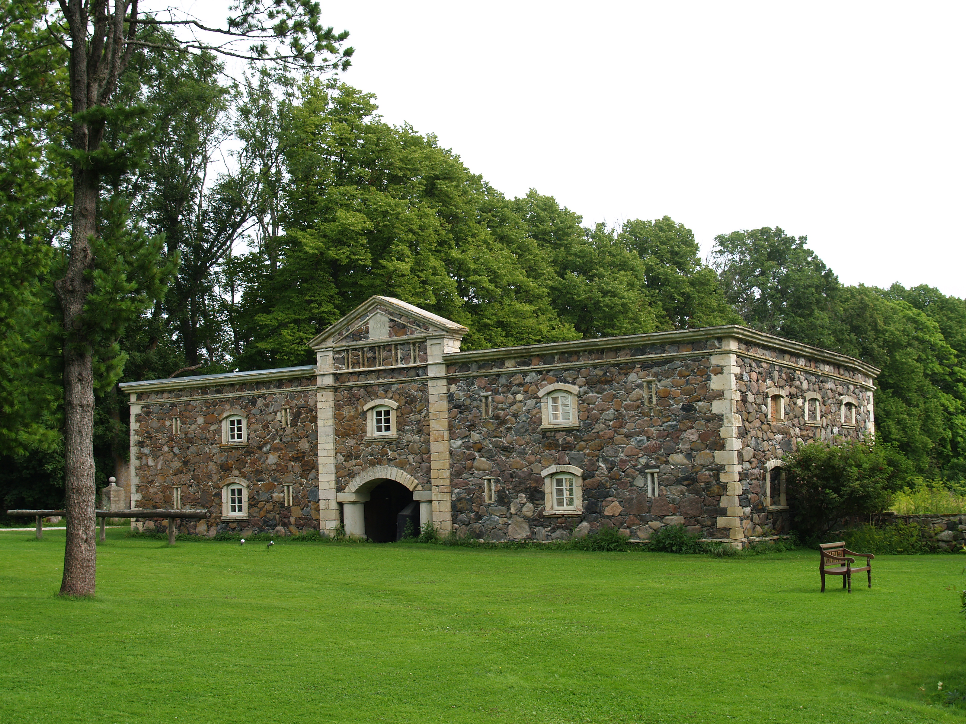 Pädaste mõisa ait